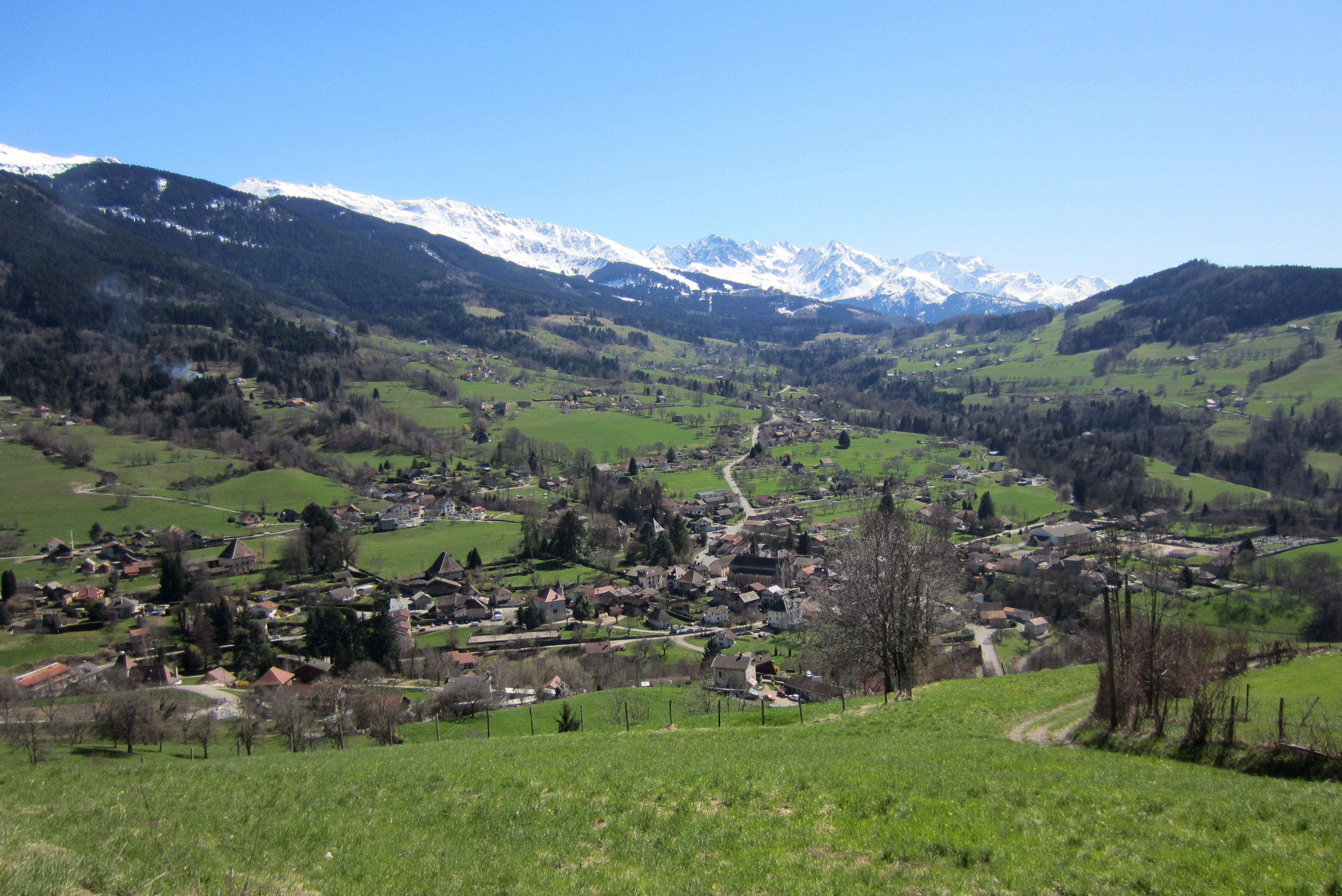 Vue du village de Theys et de la chaîne de Belledonne